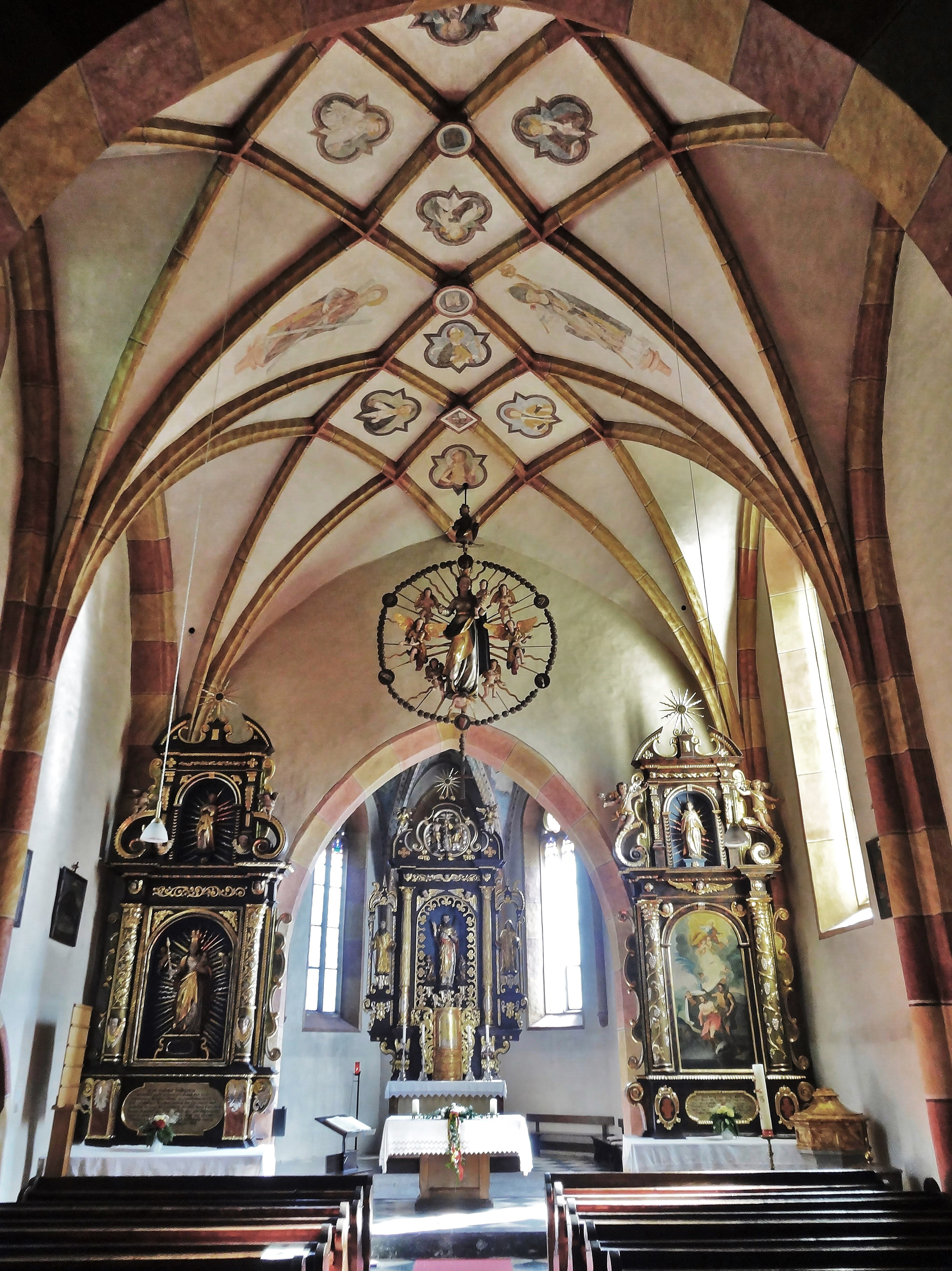 Kath. Pfarrkirche Hl. Andreas Thörl-Maglern